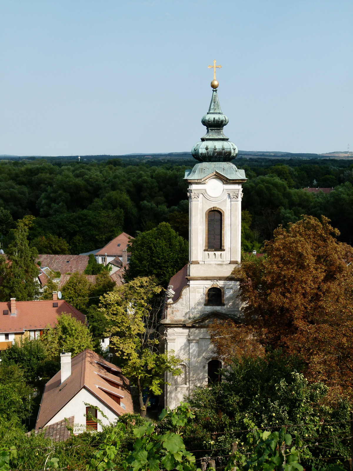 Preobrazsenszka-templom (Szentendre, Bogdányi út (volt Vöröshadsereg útja))